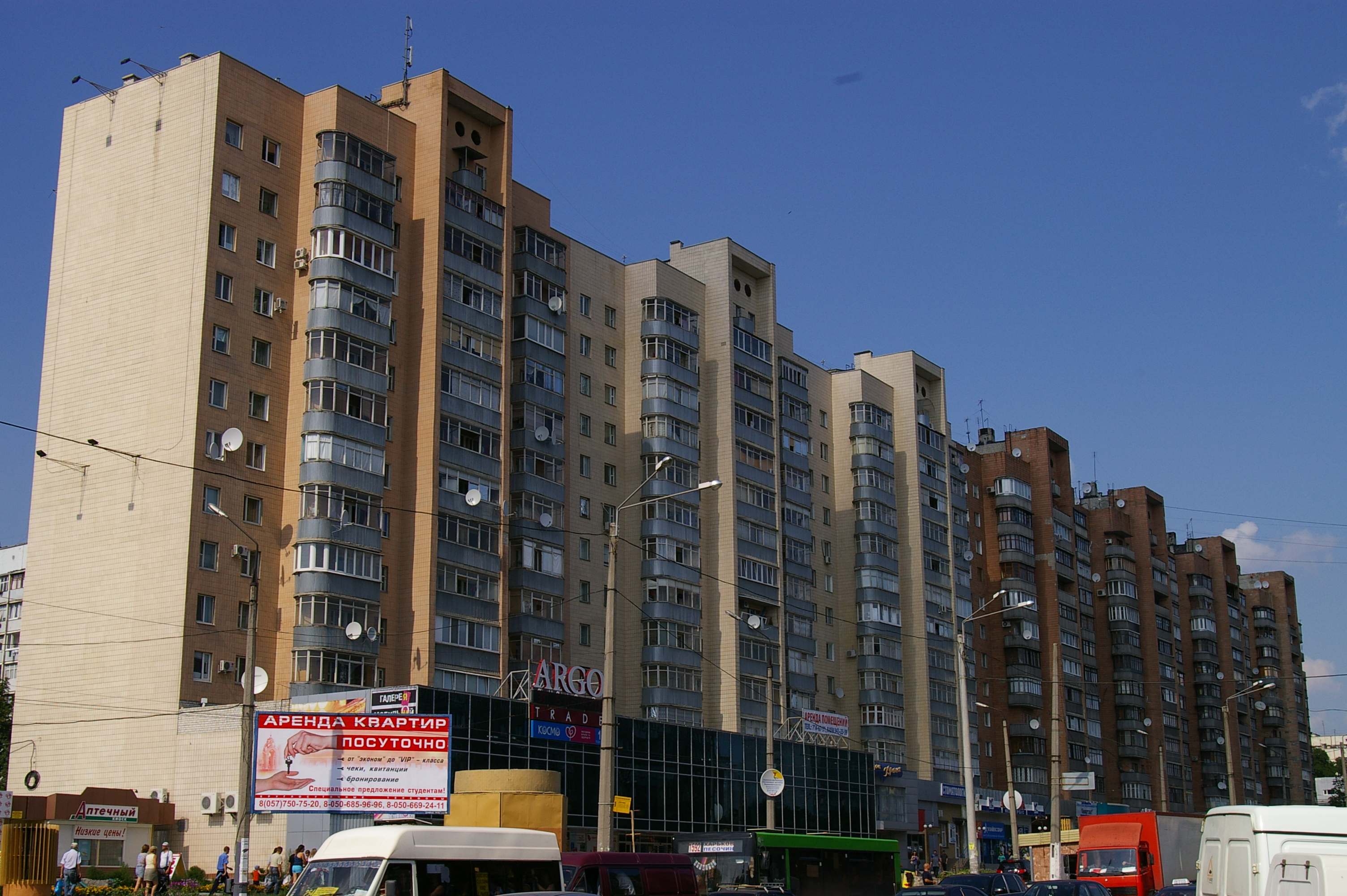 Харьков